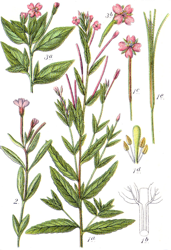 1. Epilobium tetragonum subsp. tetragonum L., syn. Epilobium adnatum Griseb. s. str. 2. Epilobium anagallidifolium Lam. 3. Epilobium alsinifolium Vill. Original Caption 1. Vierkantiges Weidenröschen, Epilobium adnatum 2. Gauchheil-Röschen, E. anagallidifolium 3. Mieren-Röschen, E. alsinifolium